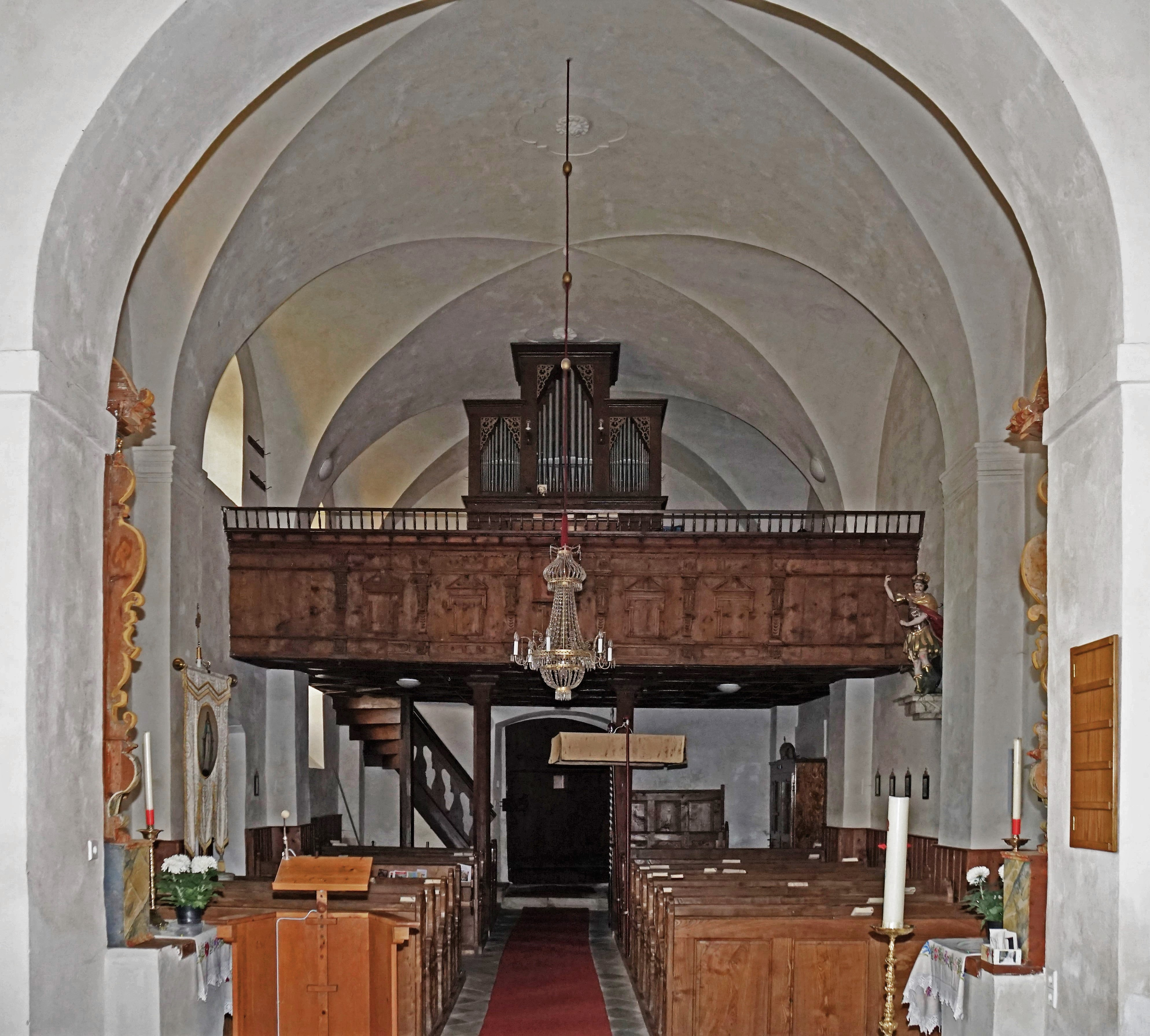 Kath. Pfarrkirche St. Philipp und St, Jakob in Arriach, Blick vom Chorraum durch das Langhaus zur Orgelempore